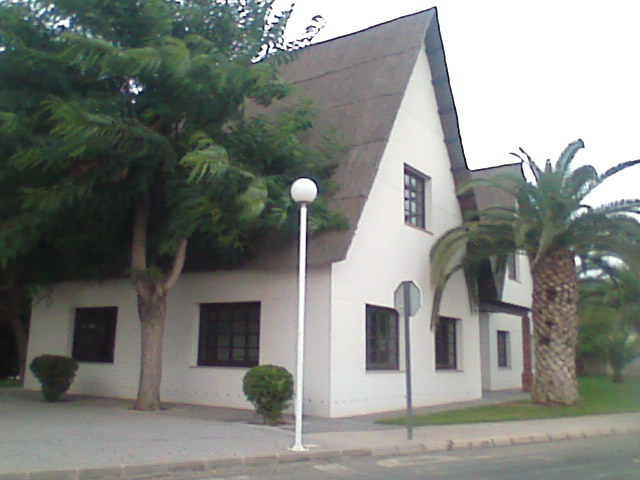 Barracas de la sede de la Universidad Miguel Hernández de Desamparados